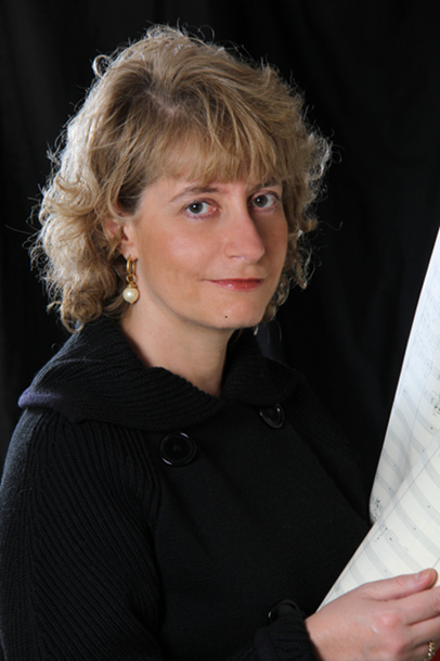 Sonia Bo, Lecco 1960